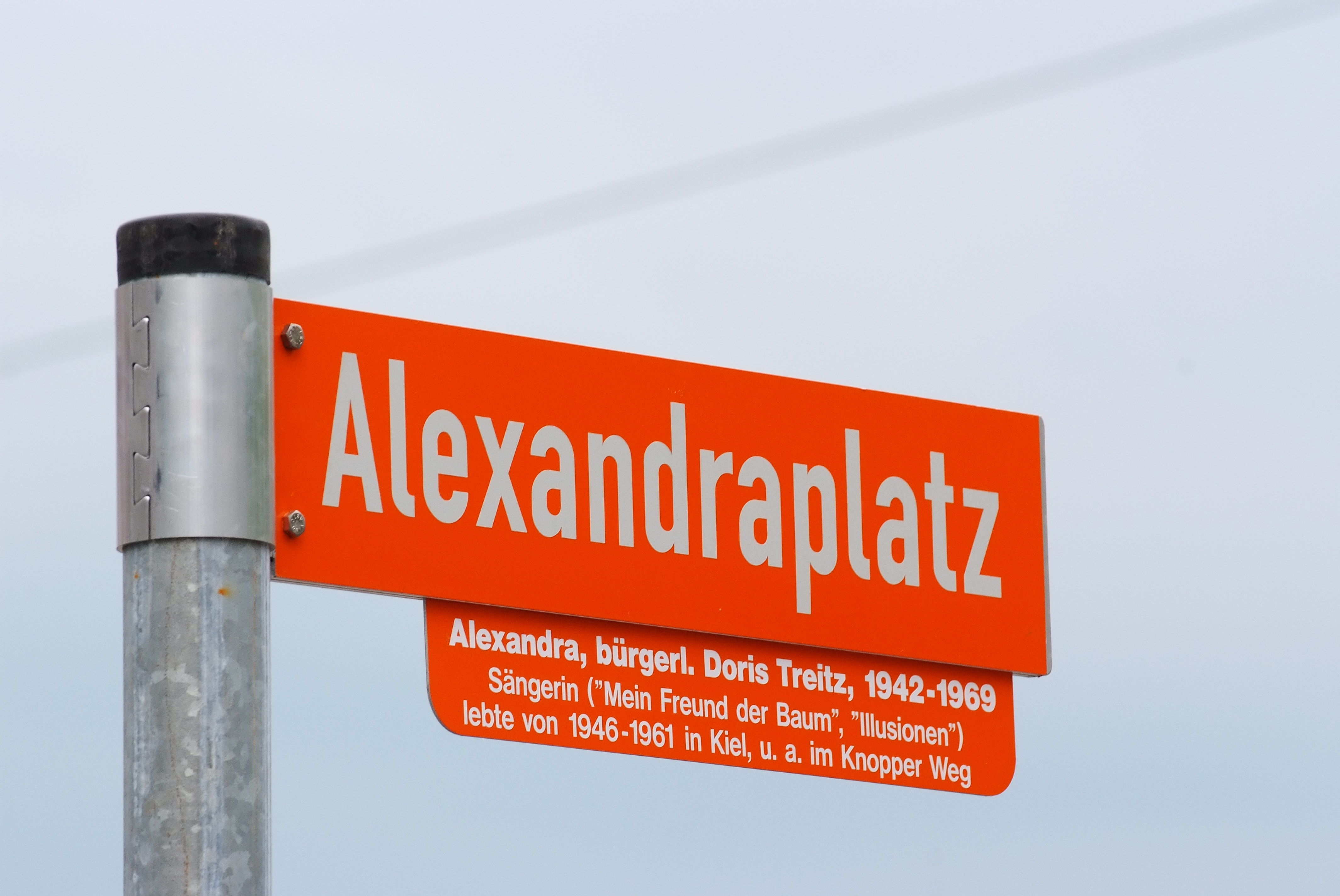 Feierliche Benennung des Alexandraplatzes in Kiel zu Ehren der Sängerin Alexandra (1942-1969). Der Weg heißt richtig: Knooper Weg (und nicht Knopper Weg wie auf dem Schild). Siehe auch Liste der Straßen und Plätze in Kiel/A.